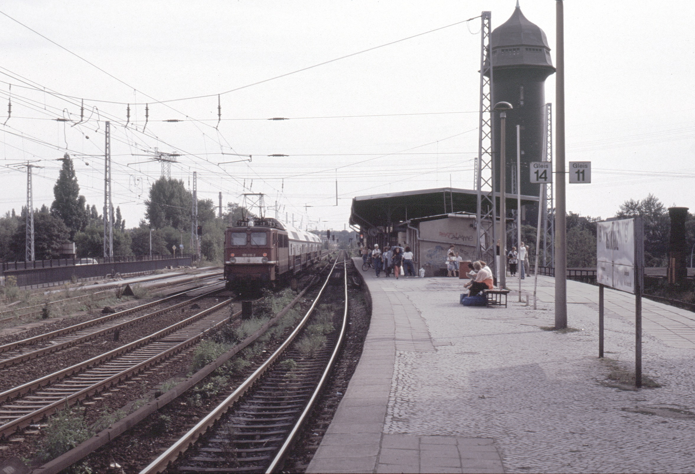 Bahnhof Berlin Ostkreuz Ringbahnsteig F